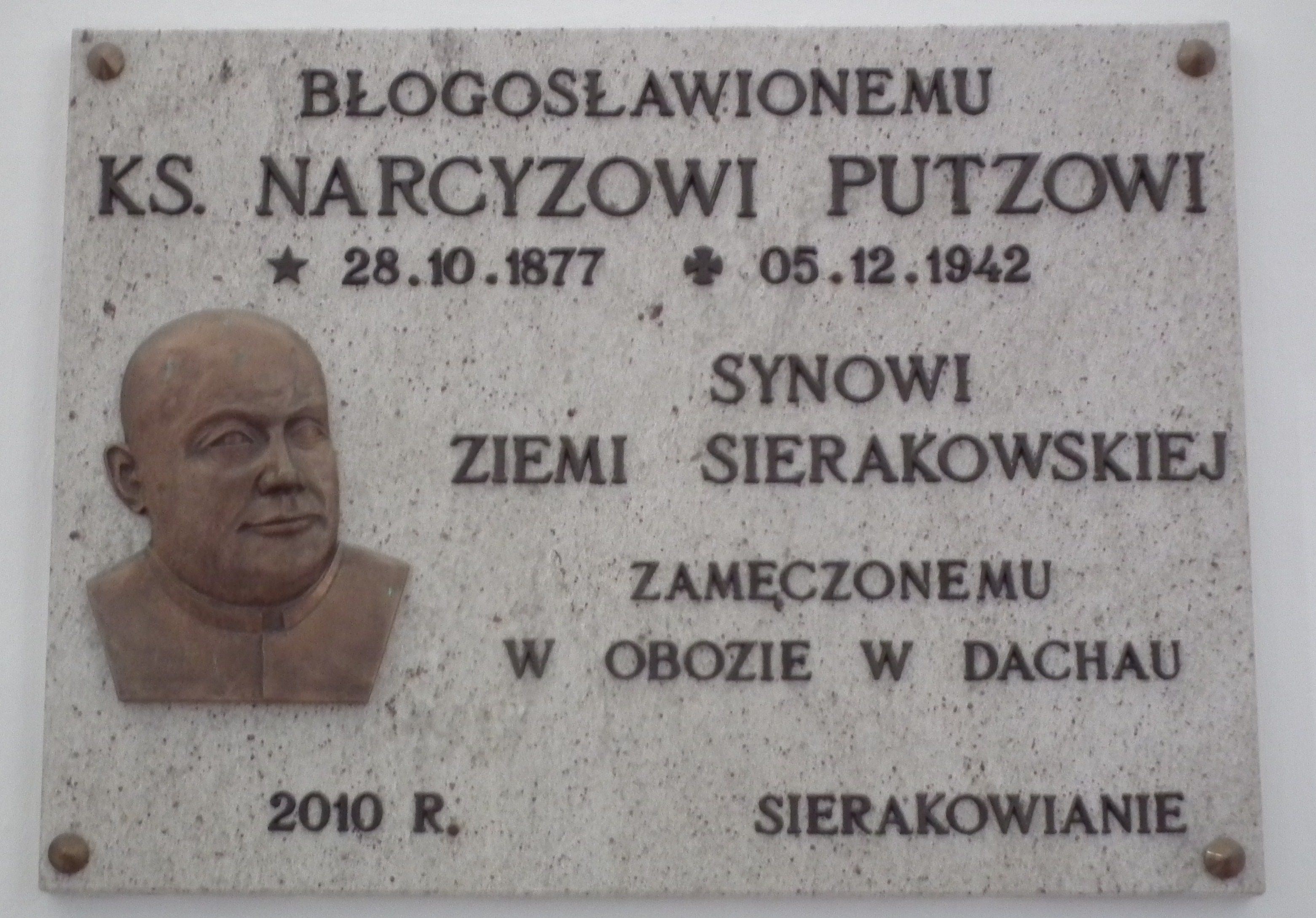 Tablica przy kościele bernardyńskim w Sierakowie.